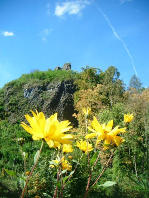 Hrad Ostrý, zřícenina (Františkov nad Ploučnicí), Františkov nad Ploučnicí